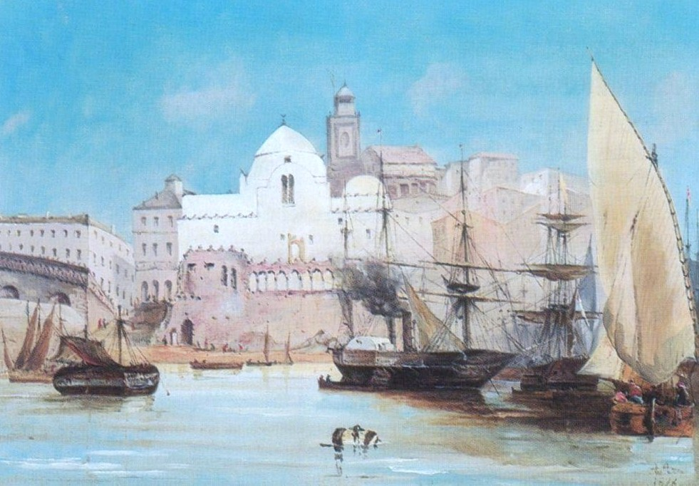 Bateaux dans le port d'Alger.